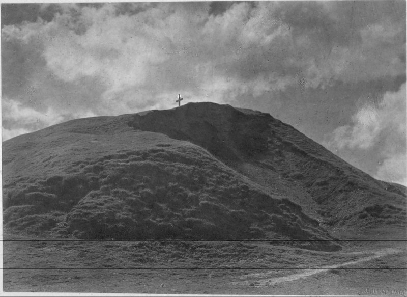 Беларуская (тарашкевіца): Наваградак (Navahradak), гара Міндоўга (Mindoŭh)